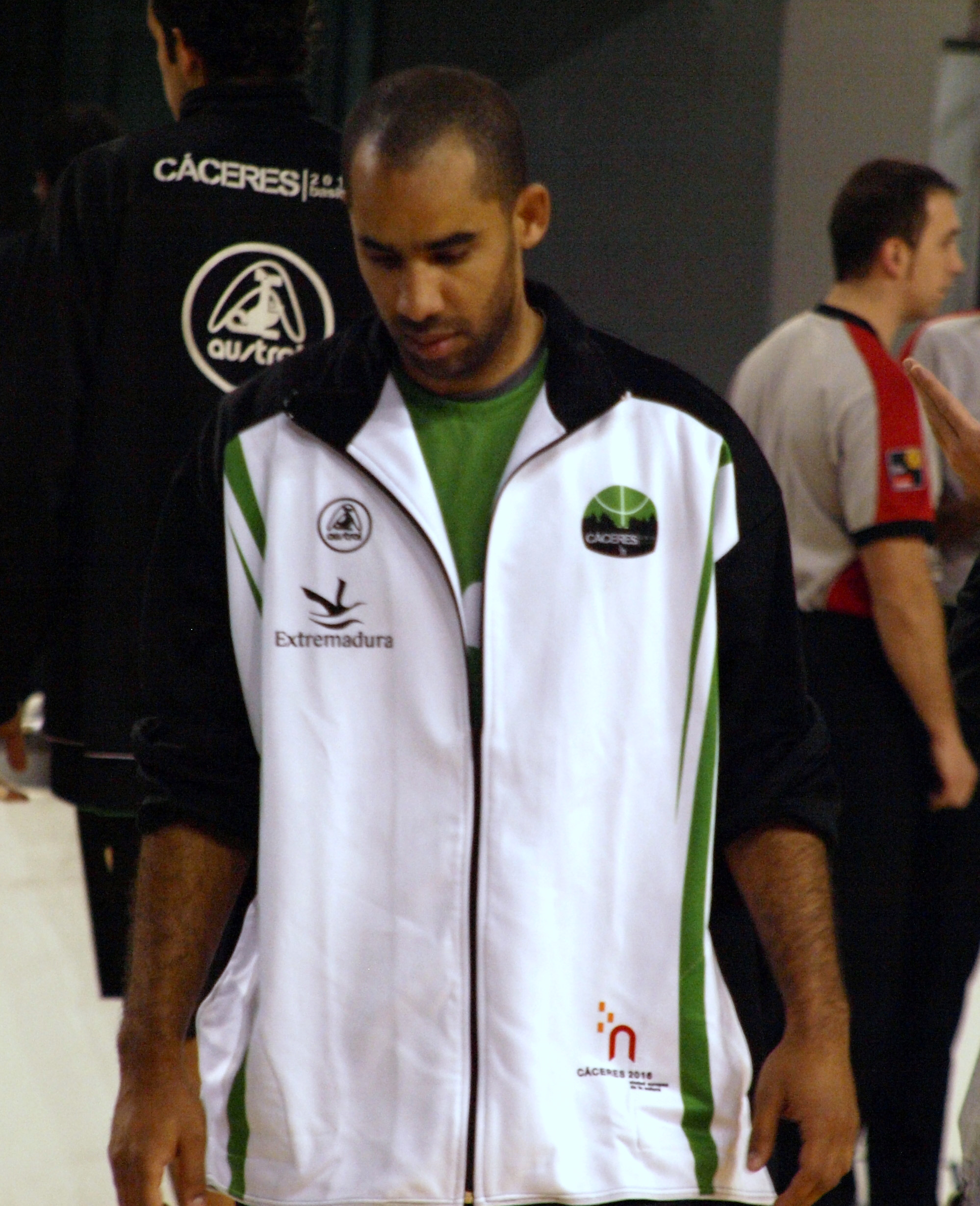 Carlos Cherry en su primer partido con la camiseta del Cáceres 2016 en LEB Oro.